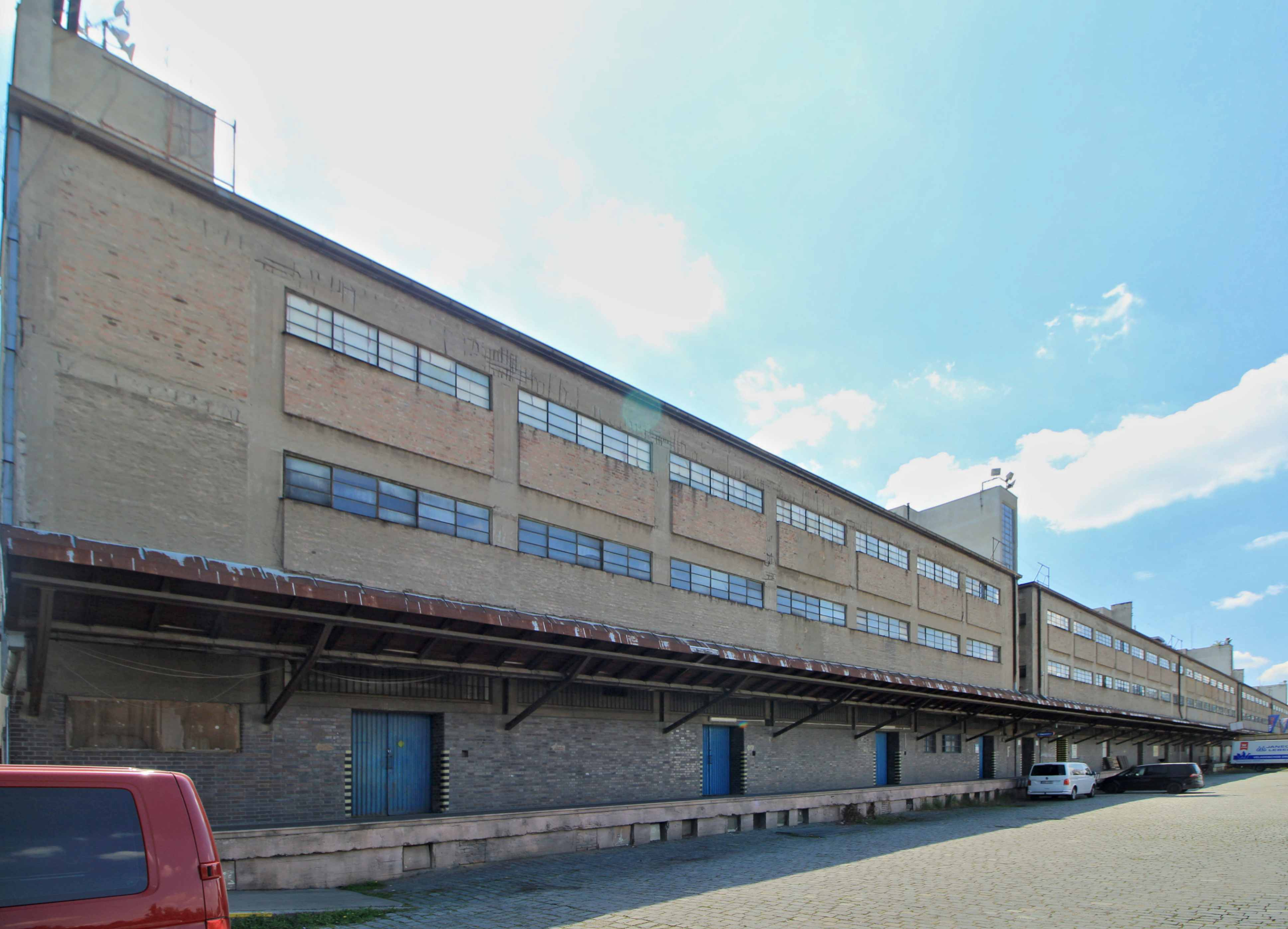 Praha-Žižkov Nákladové nádraží